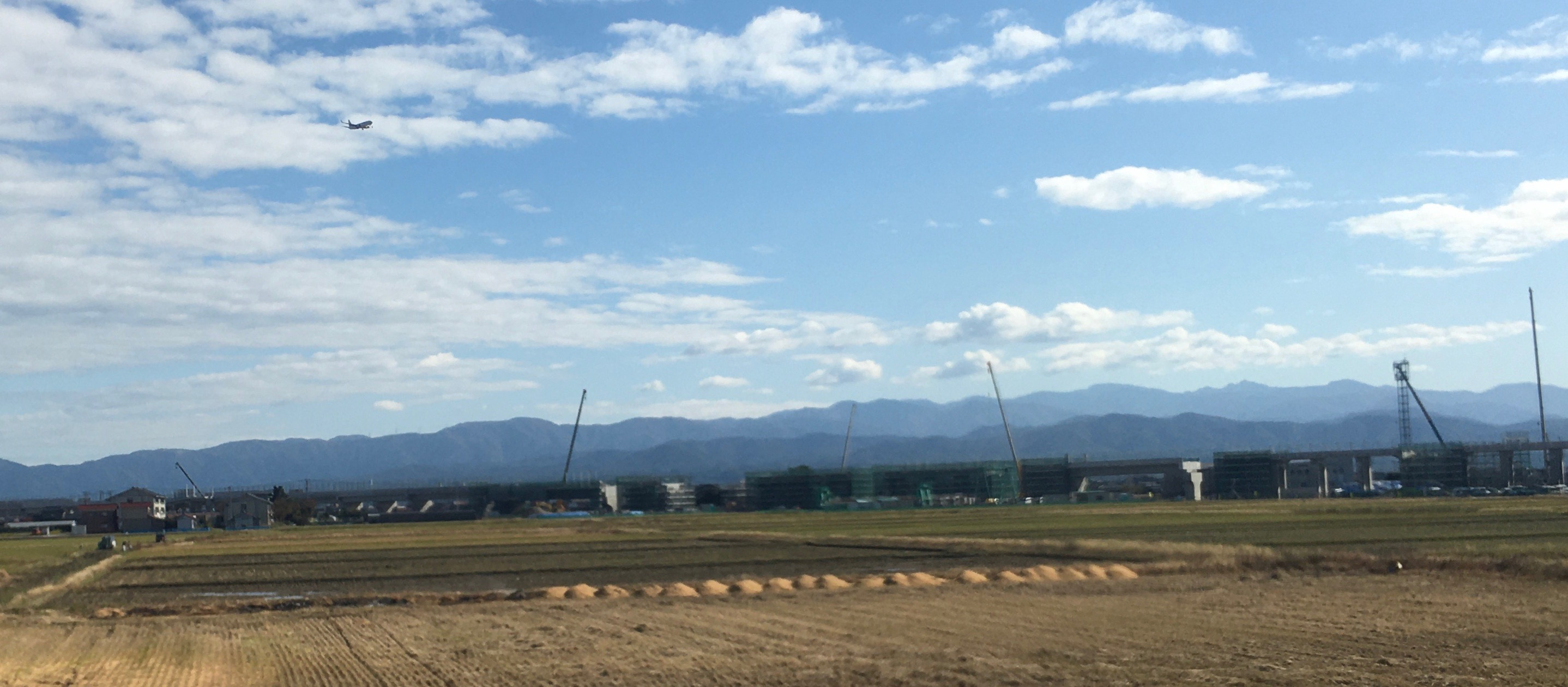 Hokuriku-Shinkansen, 3. Bauabschnitt; im Bau, Nähe Komatsu, November 2019